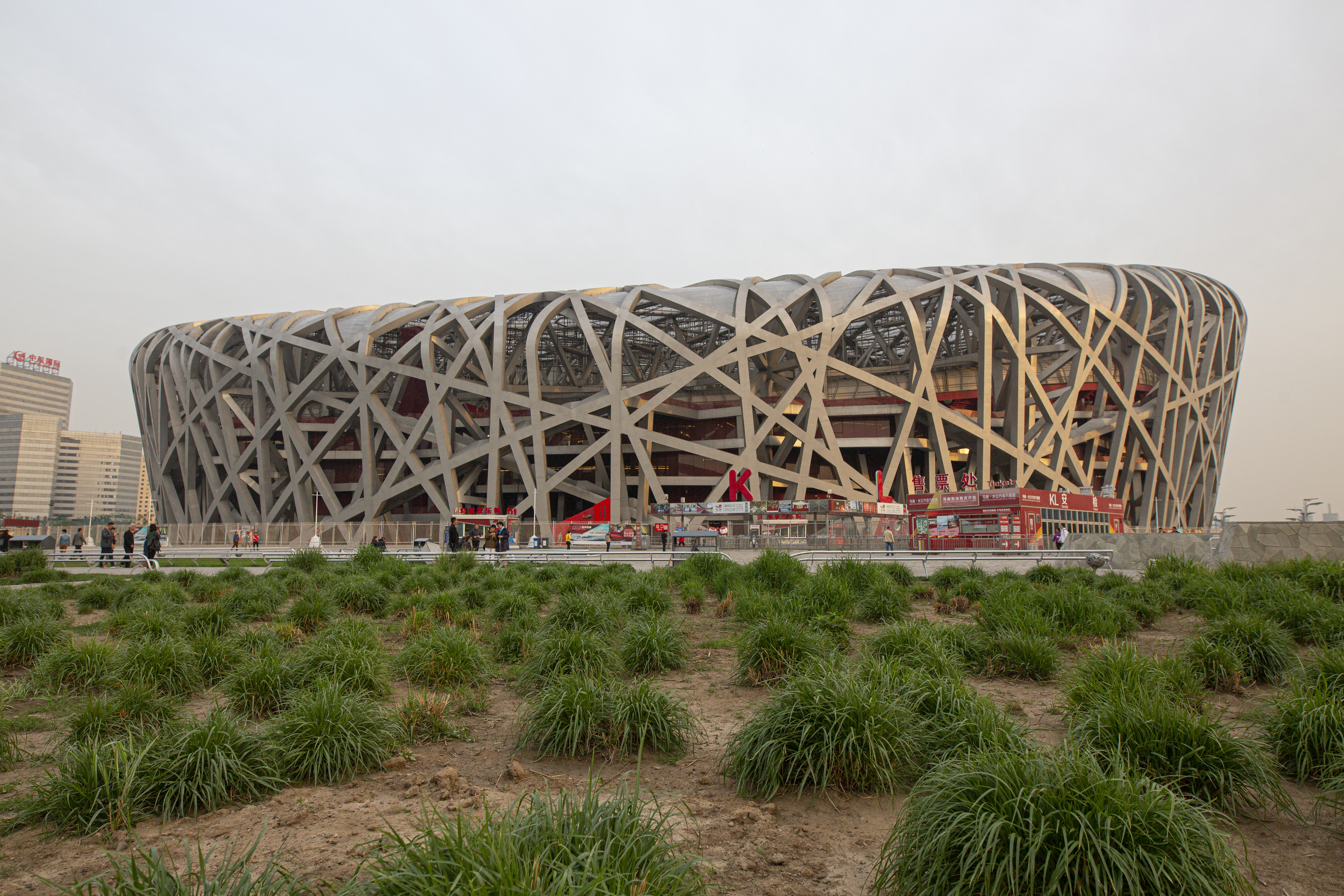 Beijing National Stadium